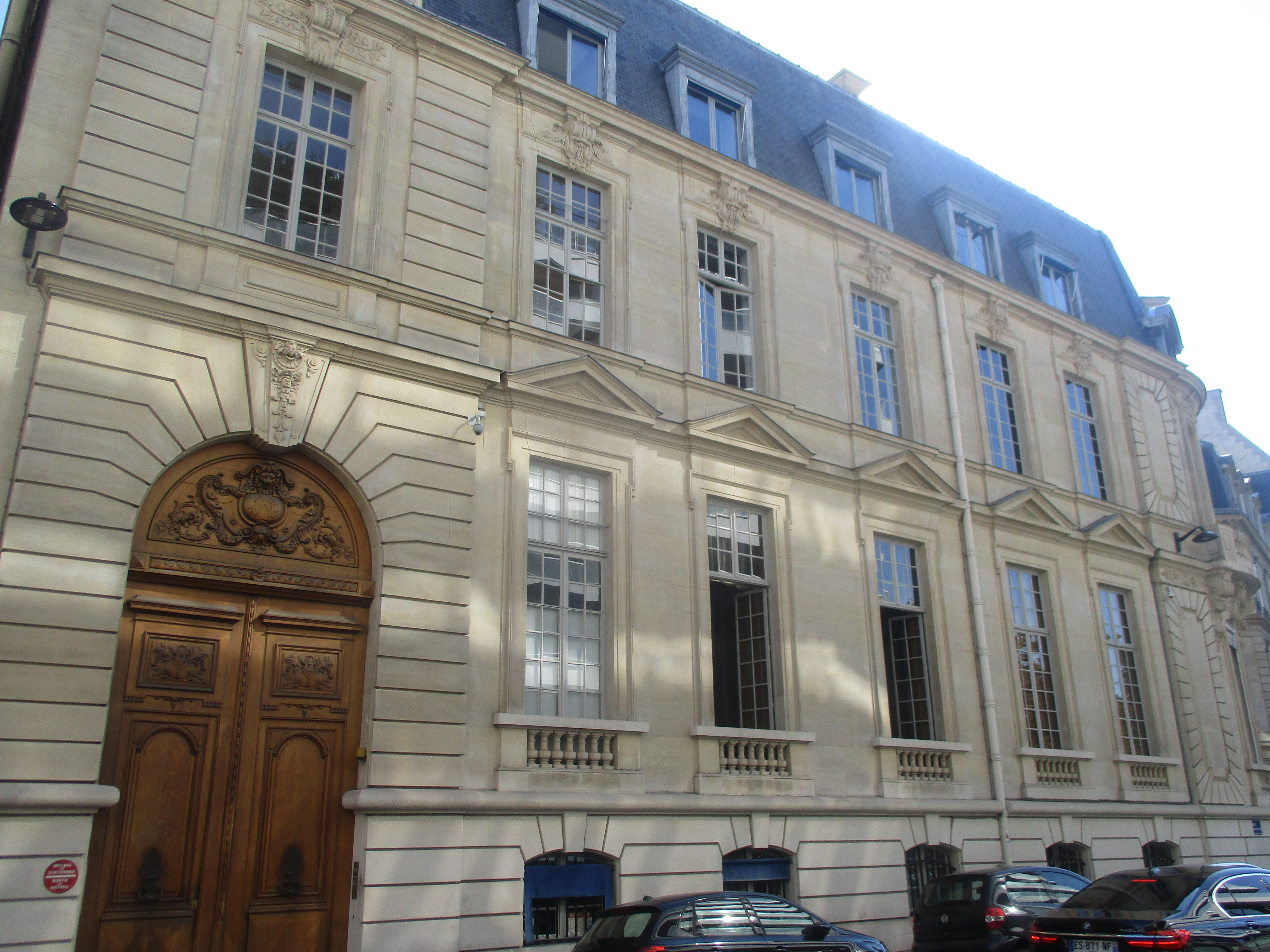 Hôtel Cahen d'Anvers, 2 rue de Bassano, Paris XVIe.